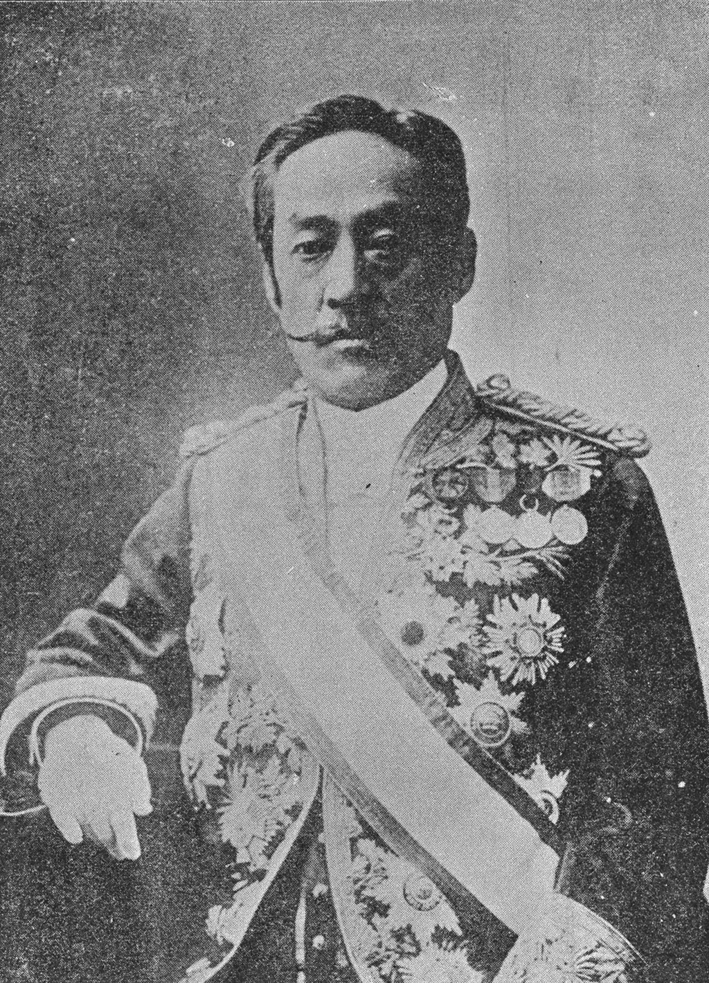 Portrait of Iwakura Tomosada (岩倉具定, 1852 – 1910)